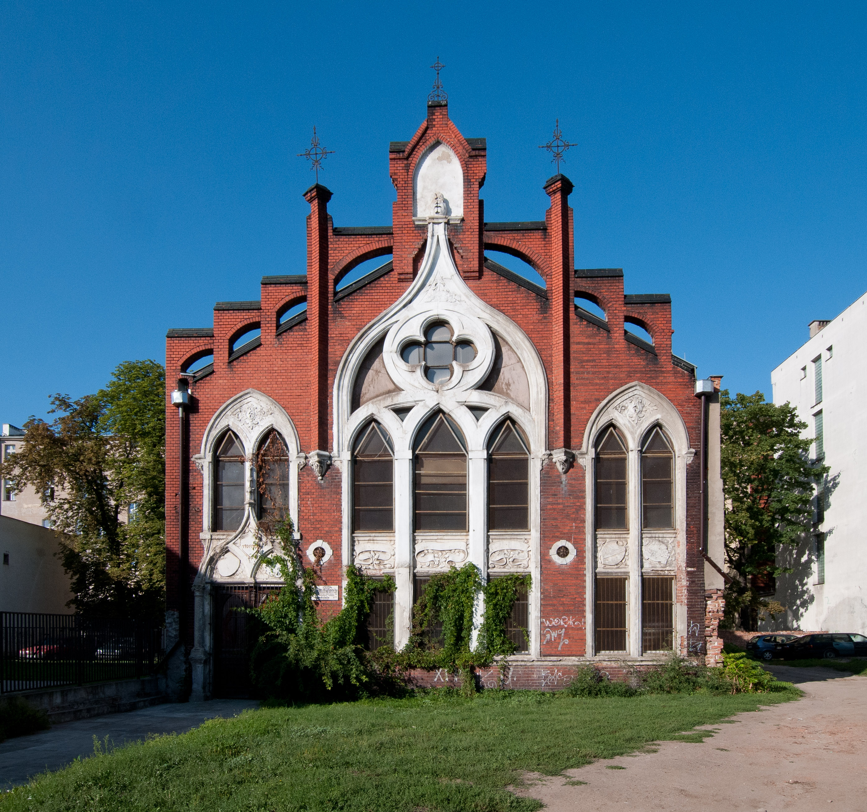 Kaplica Wolnego Kościoła Ewangelicko-Reformowanego, ob. Kościoła Ewangelicko-Metodystycznego w RP. Wrocław, ul. Worcella